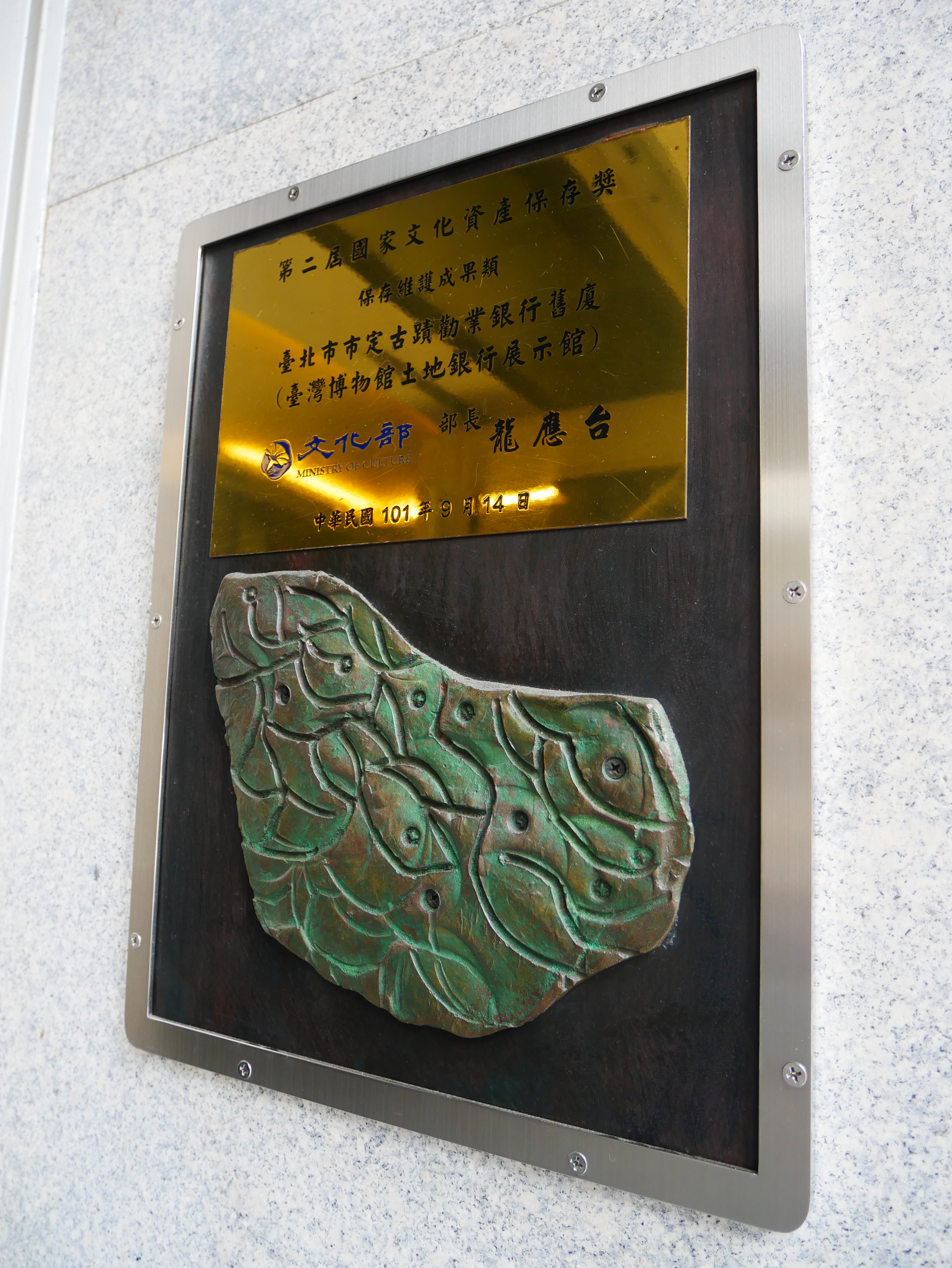 第二屆國家文化資產保存獎獎牌（國立臺灣博物館土銀展示館），臺北市中正區城內次分區黎明里